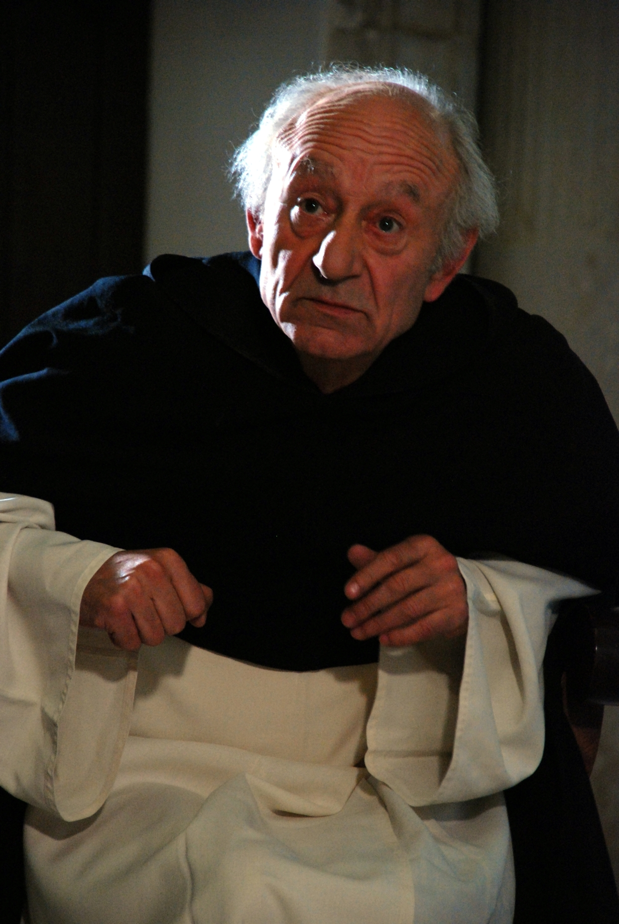 Actuación de Txema Blasco en "Badaezpada: El vecino afectuoso" de Pello Varela, rodada en 2007.